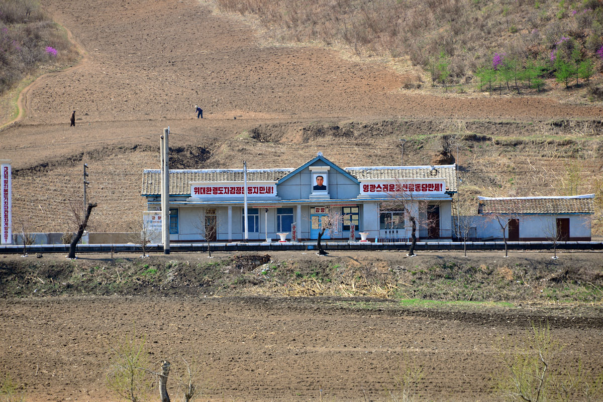 咸镜北道江阳站